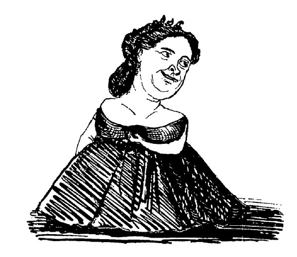 Suzanne Lagier, par Lemercier de Neuville